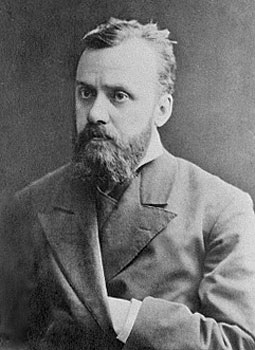 Gleb Uspenskij (1843-1902)